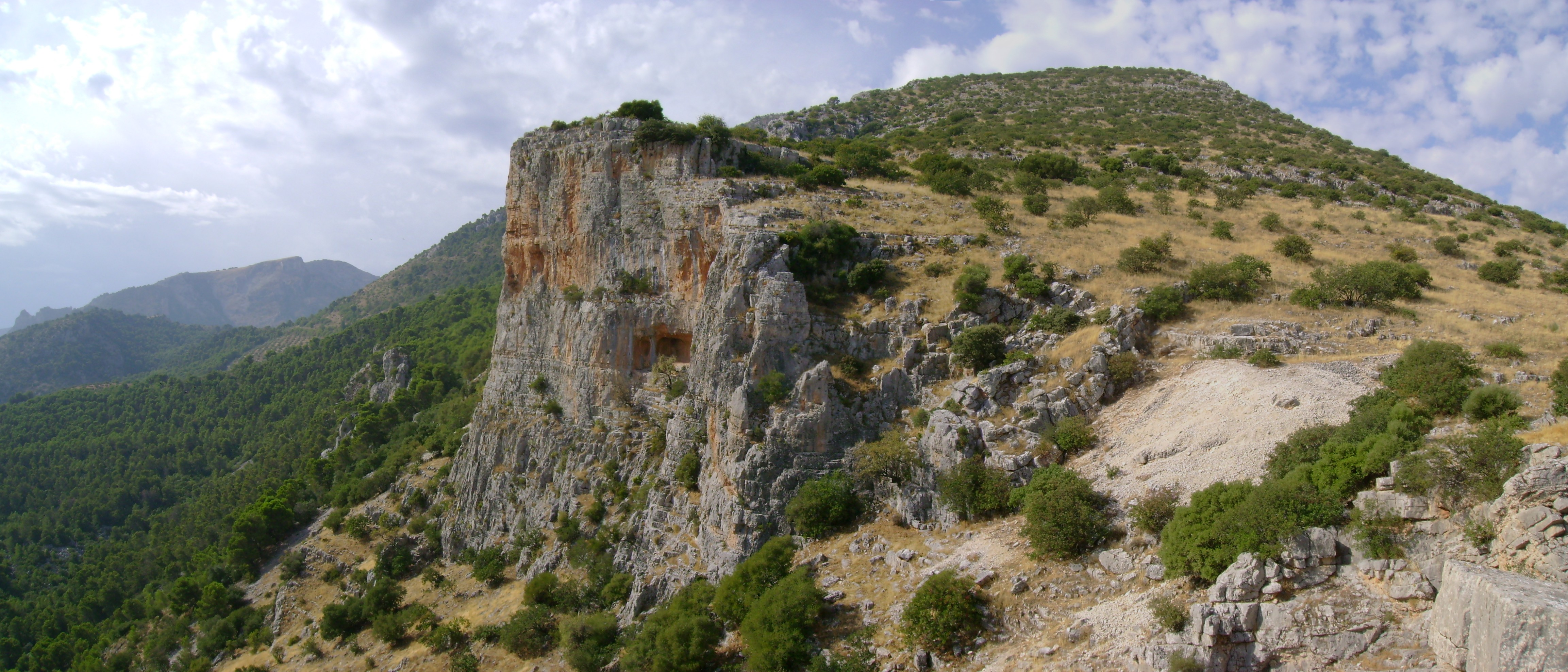 Panorámica de la Cueva de los Soles en Otíñar (Jaén)